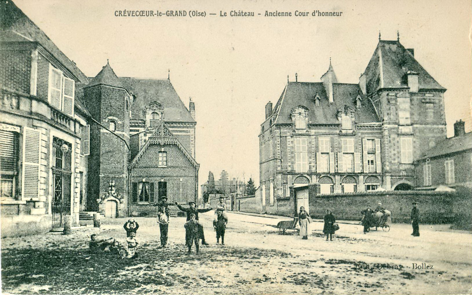 Carte postale ancienne éditée par Debray-Bollez Crèvecœur-le-Grand : Le Château - Ancienne cour d'honneur